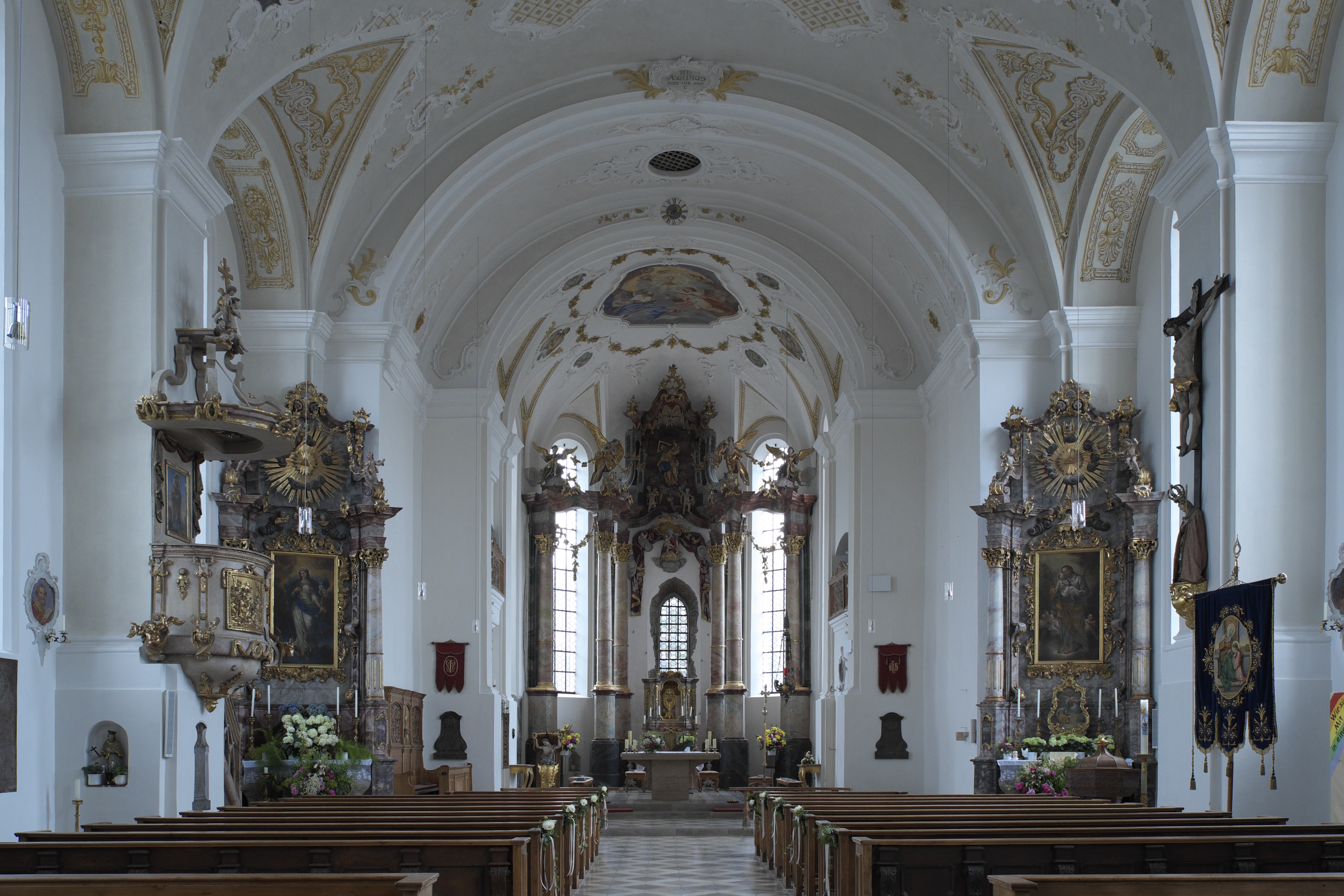 Katholische Pfarrkirche St. Ägidius in Grafing bei München im Landkreis Ebersberg (Bayern/Deutschland), Innenraum